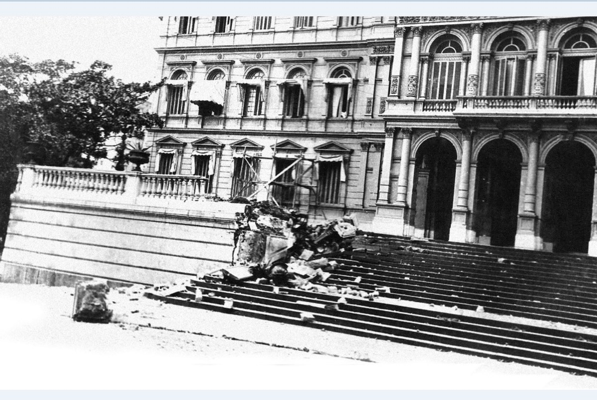 Buenos Aires, junio de 1955. La Casa Rosada tras los bombardeos de junio de 1955.